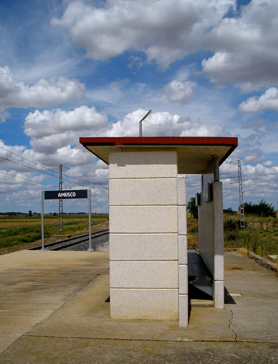 Apeadero de Renfe en Amusco (Palencia)